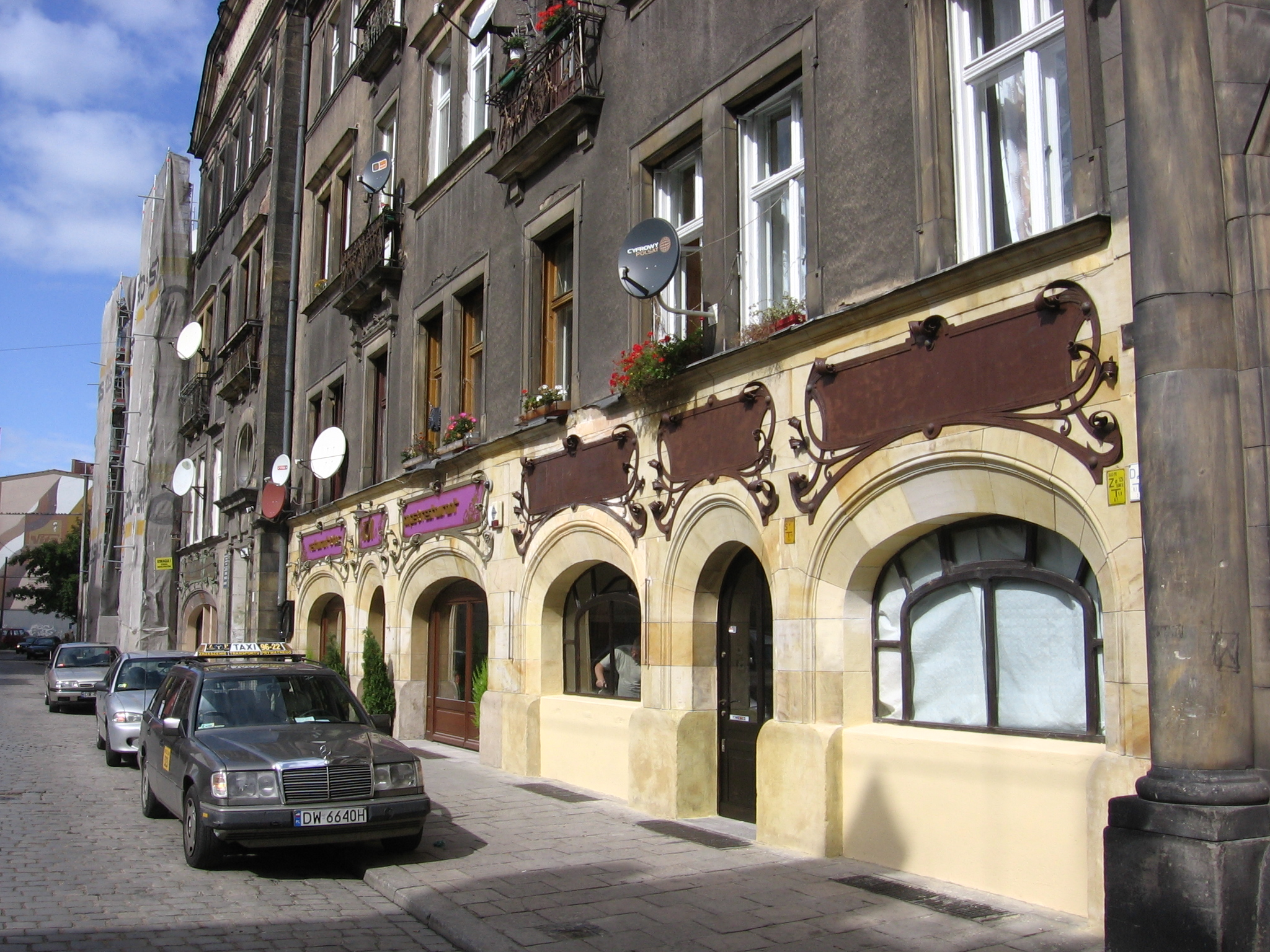 budynki przy ul. Włodkowica 7 we Wrocławiu (po prawej fragment bramy wjazdowej do Synagogi Pod Białym Bocianem) i 9 (w głębi), dalej remontowana elewacja posesji nr 11